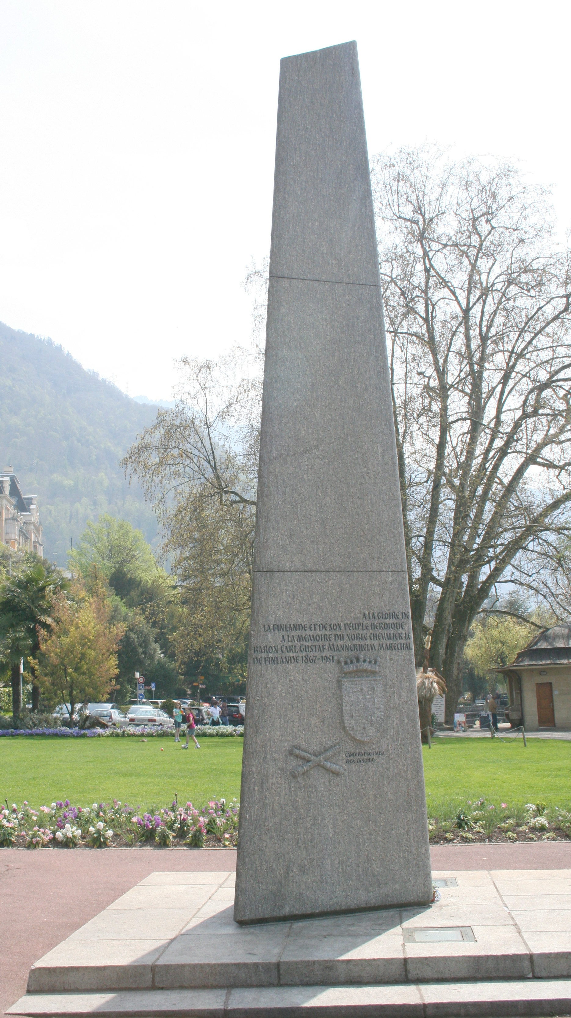 Mannerheimin muistopatsas Montreaux'ssa.